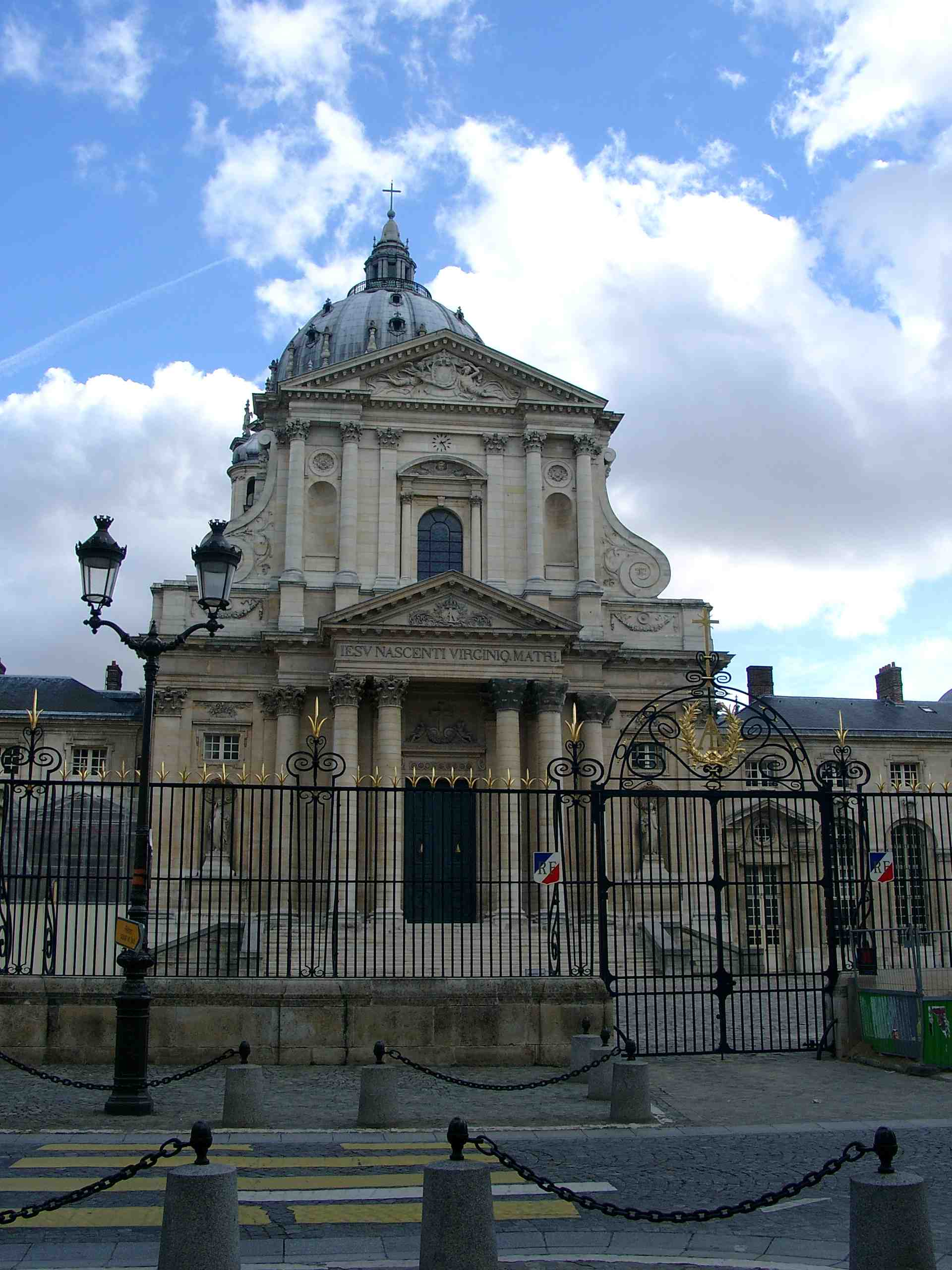 former Abbey Val-de-Grâce, Paris, rue St-Jacques